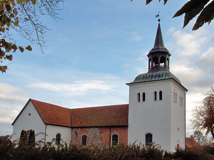 fra nordvest